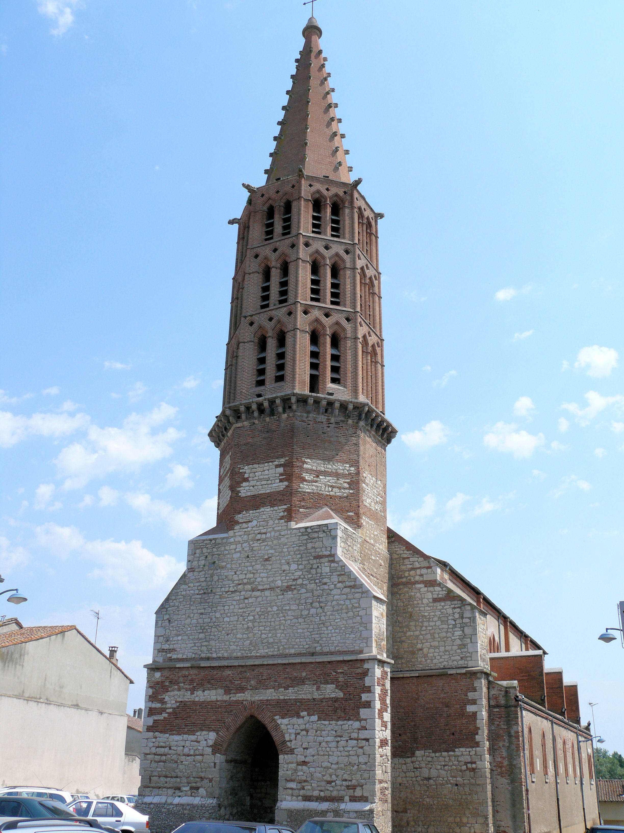 Nègrepelisse - Eglise Saint-Pierre-aux-Liens - Clocher